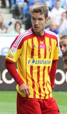 Kamil Sylwestrzak w barwach Korony Kielce.